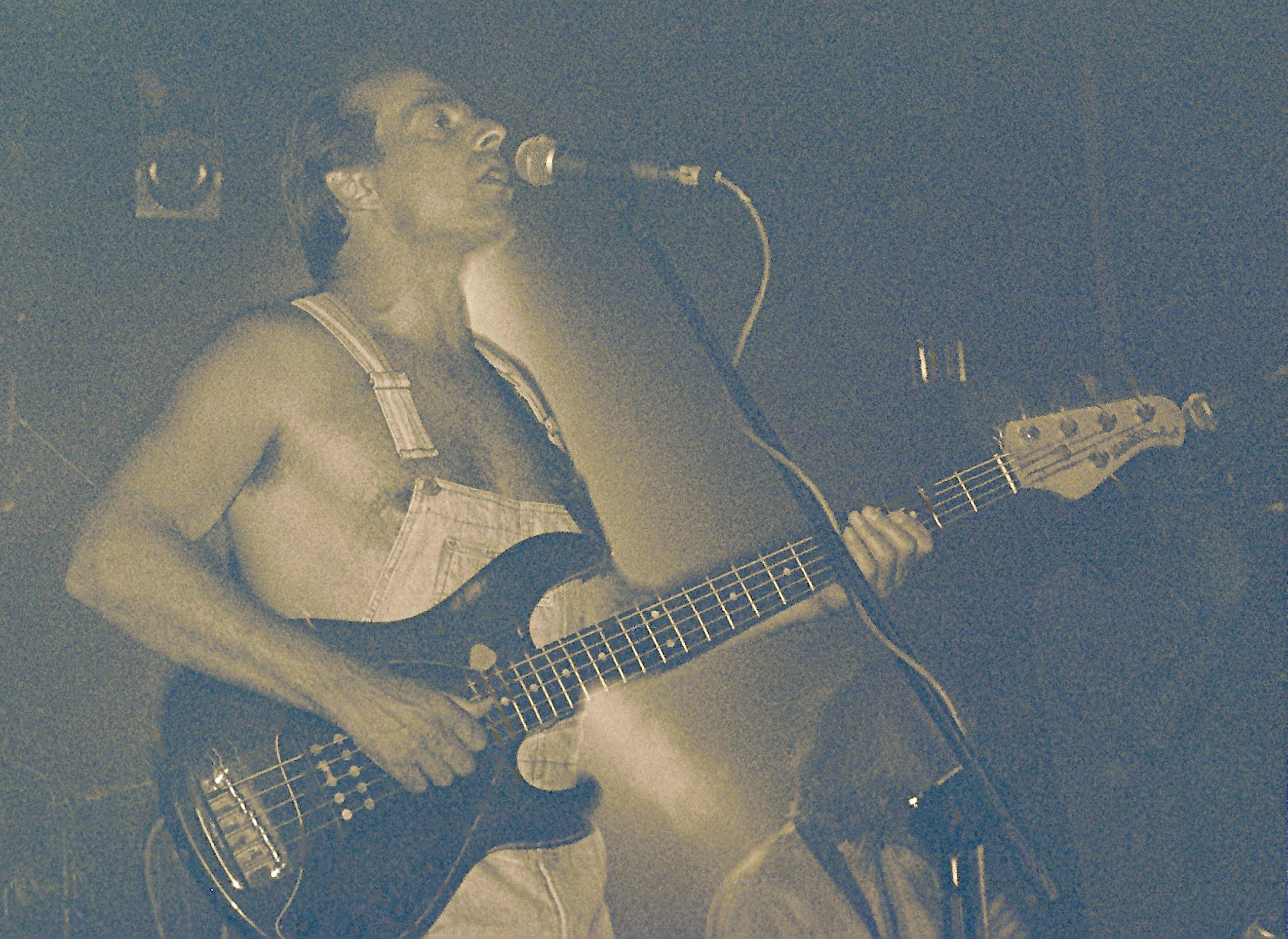 Jan Pospieszalski